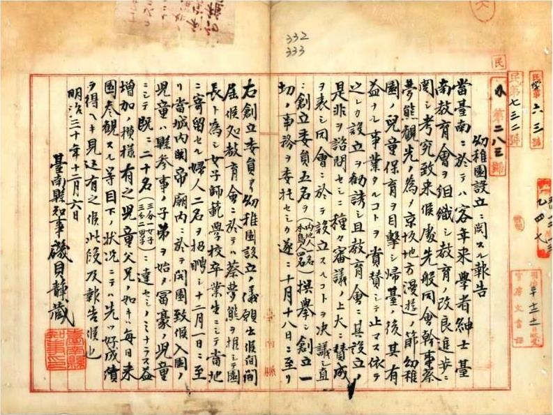 蔡夢熊任幹事, 創立委員五名（本島人四名、日本內地人一名）